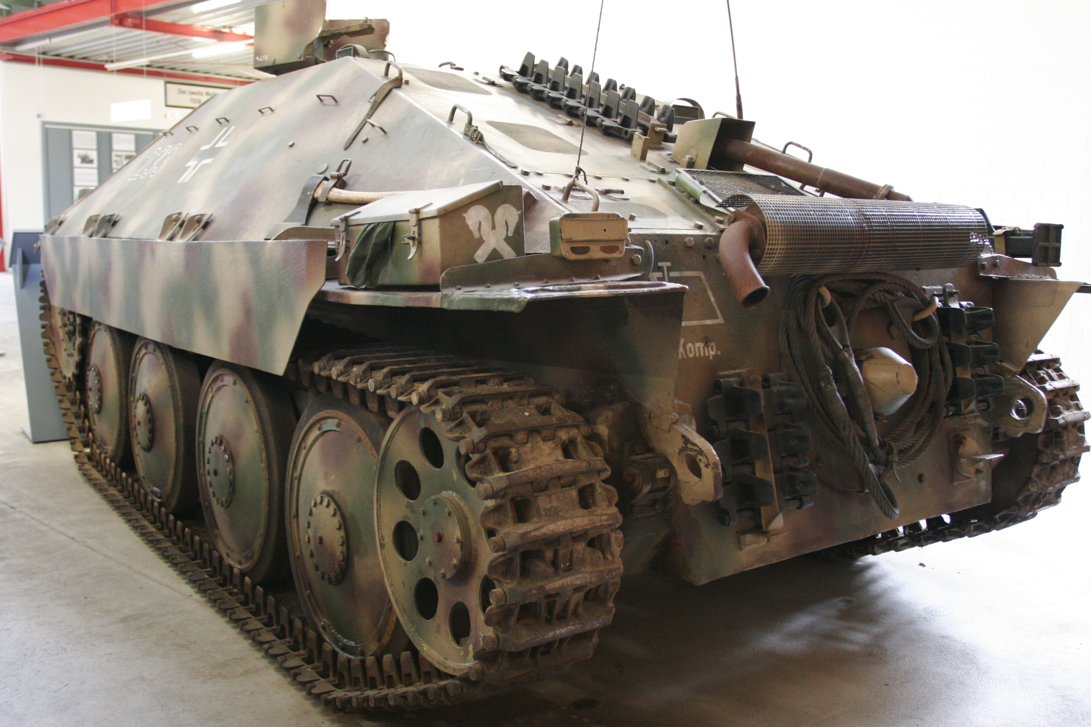 Jagdpanzer 38(t) (Sd.Kfz. 138/2) / Back on display at the Deutsches Panzermuseum Munster , Germany.